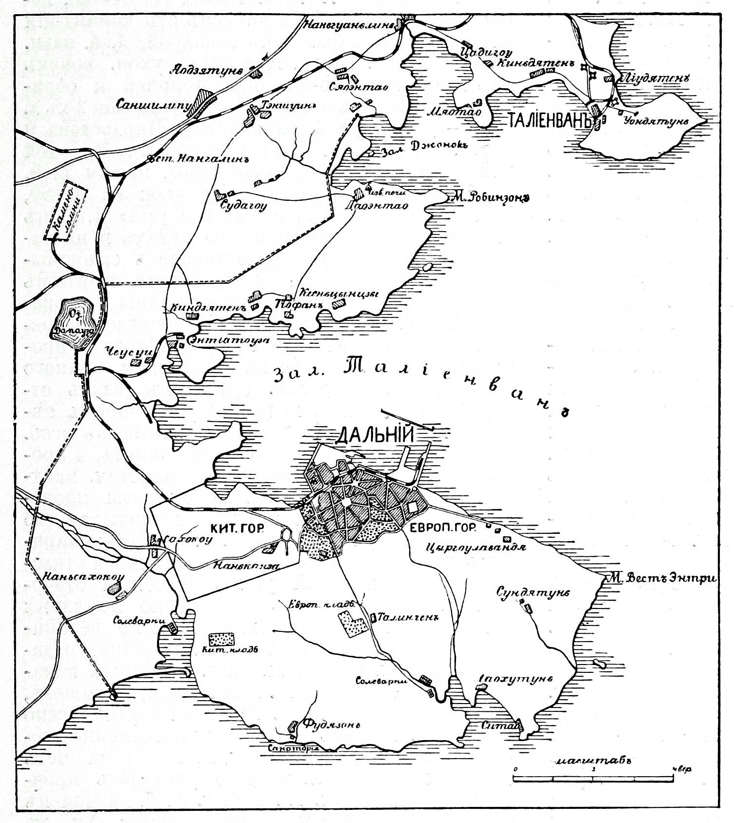 Это изо было использовано в статье «Дальний» опубликованной в восьмом томе «Военной энциклопедии», который был издан книгоиздательским товариществом И. Д. Сытина в 1912 году в столице Российской империи городе Санкт-Петербурге.